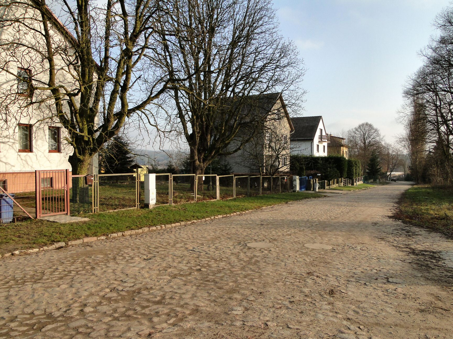 Ul. Bielańska w Szczecinie Kluczu